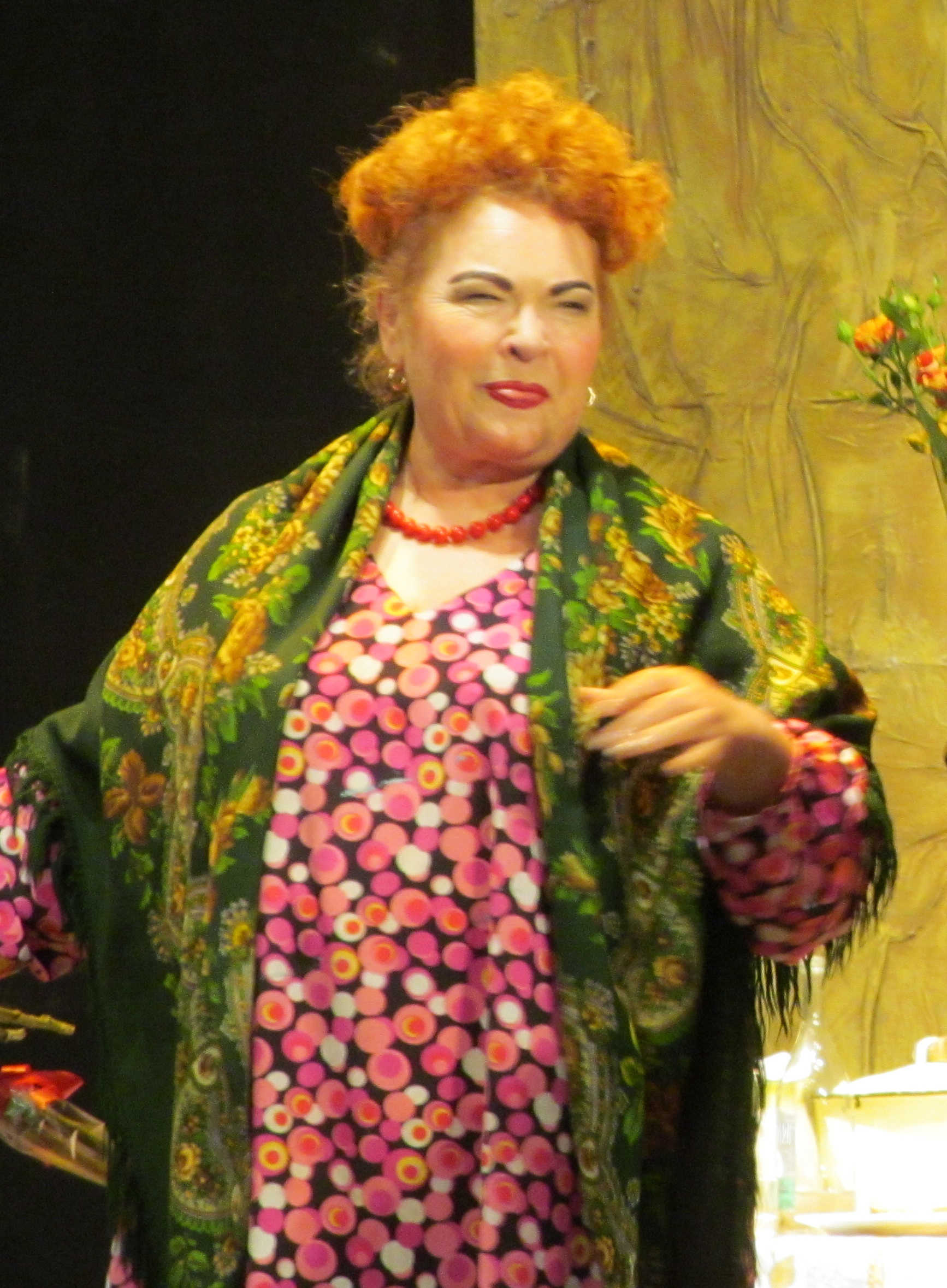 Нина Усатова на сцене Пермского Большого зала филармонии, 23.02.2015